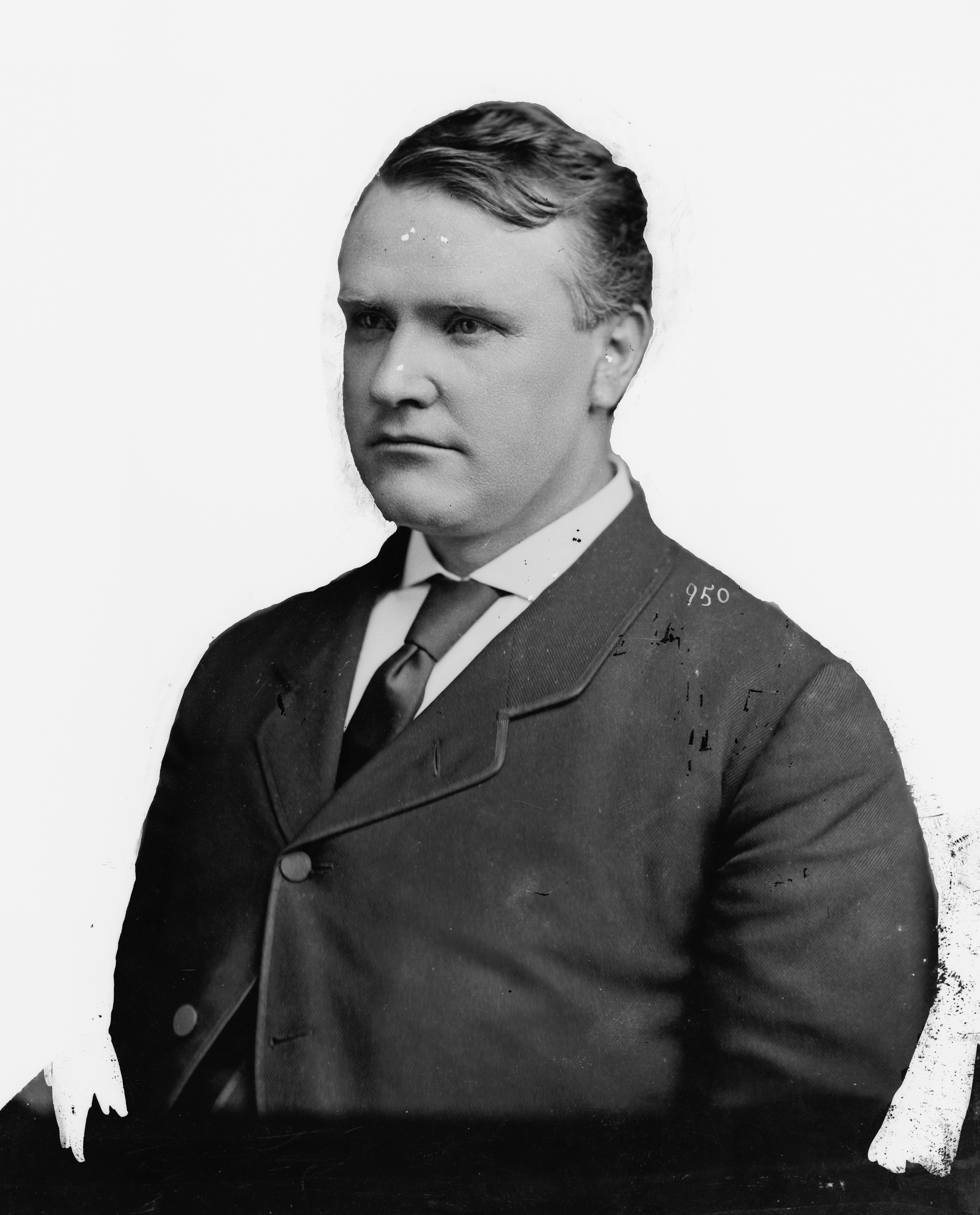 Stephen Benton Elkins (1841–1911)